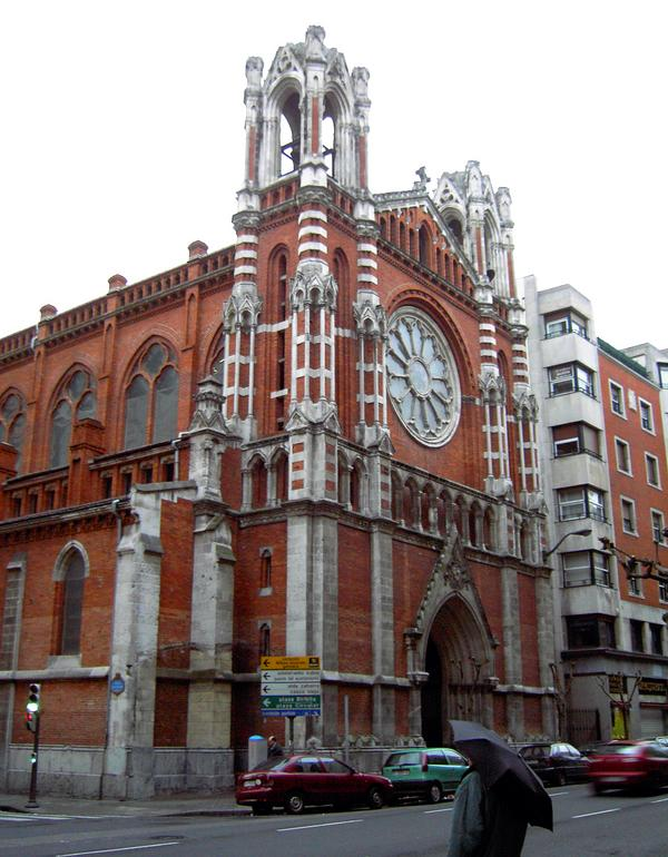 Erresidentziaren Eliza, Urkixo Zumarkalea, Bilboko Abando barrutia.